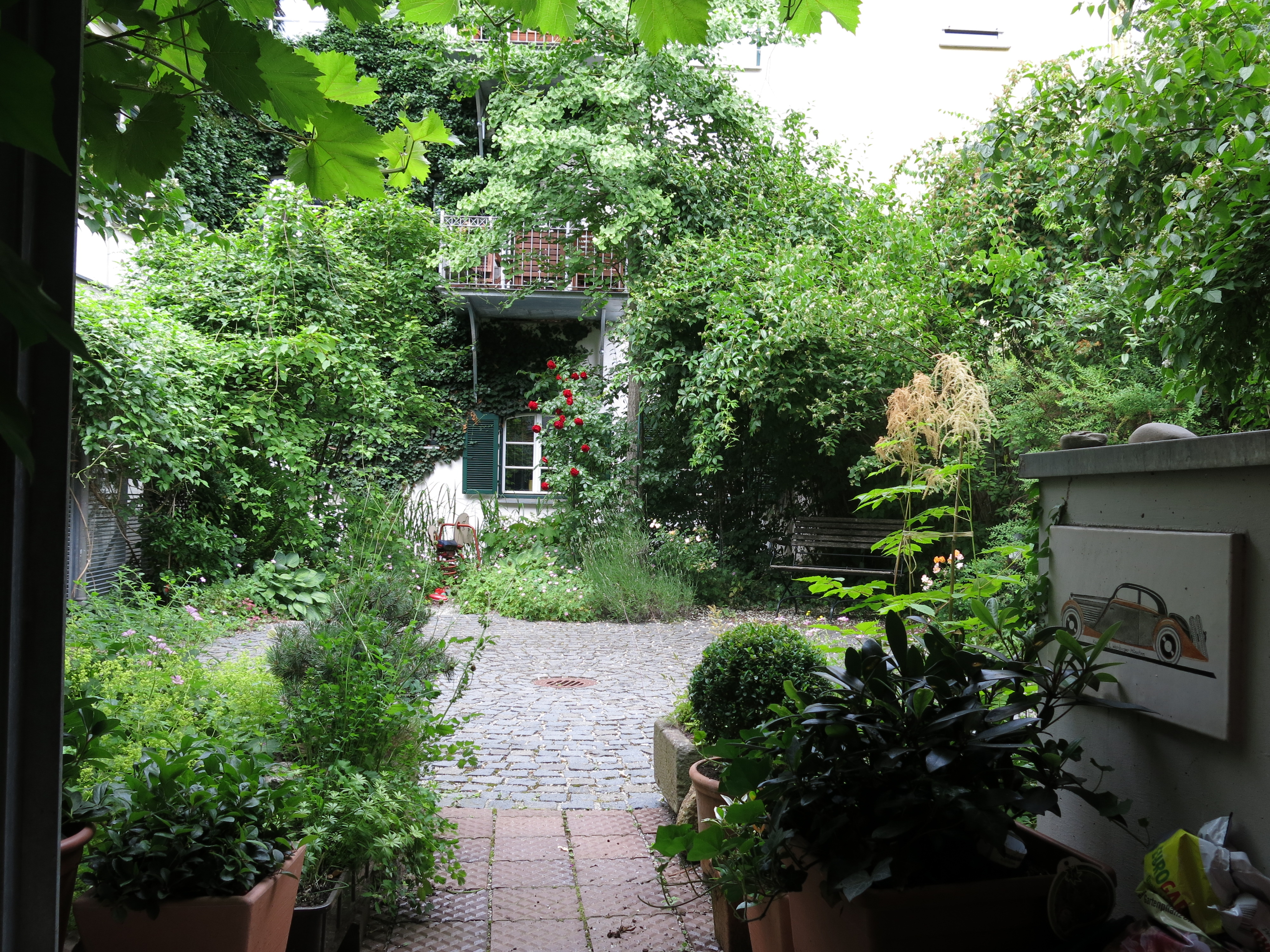 Zeppelinstraße 41 (München) Hinterhof